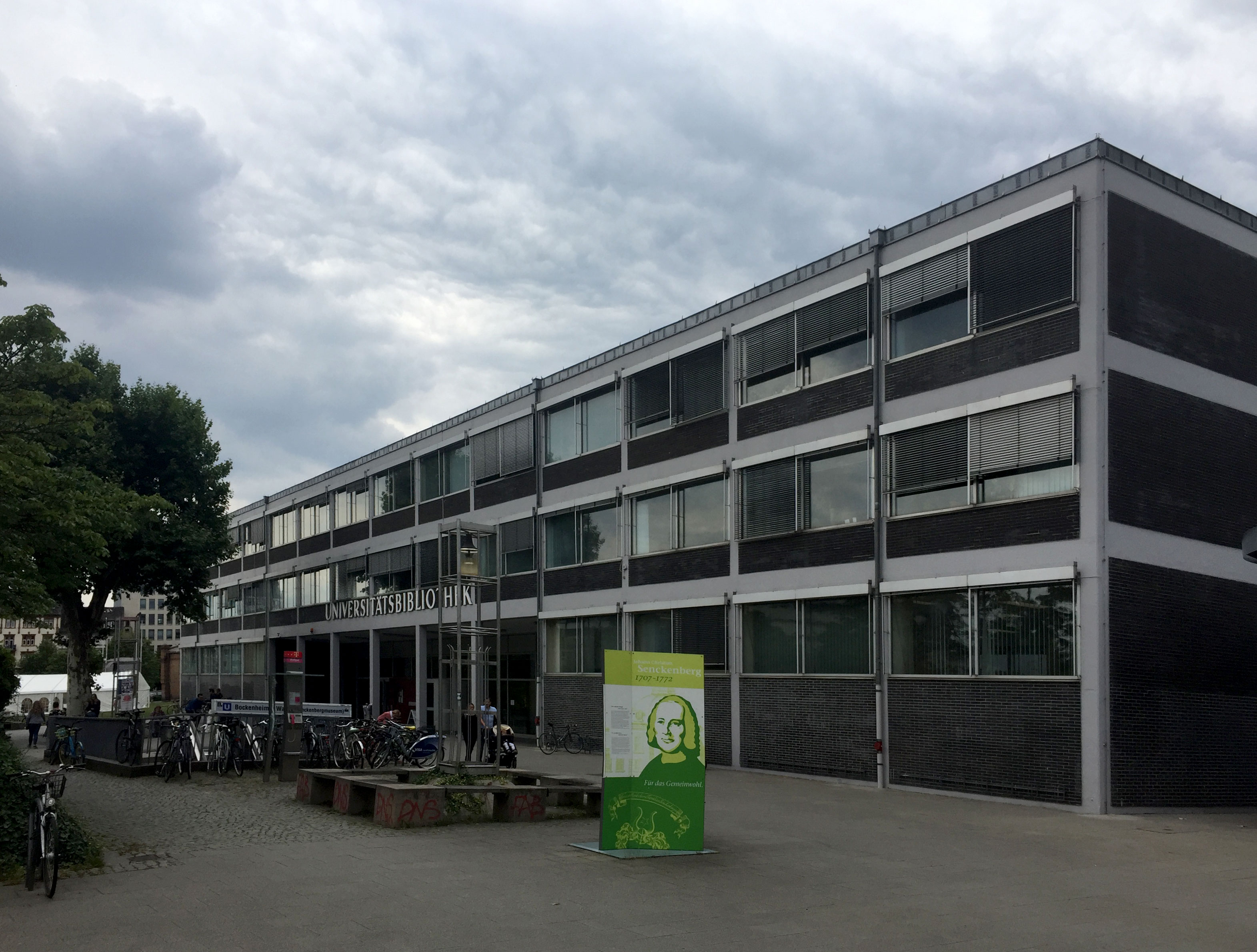 Bau der Zentralbibliothek, Universitätsbibliothek „Johann Christian Senckenberg“ – Architekt: Ferdinand Kramer (1965 fertiggestellt)